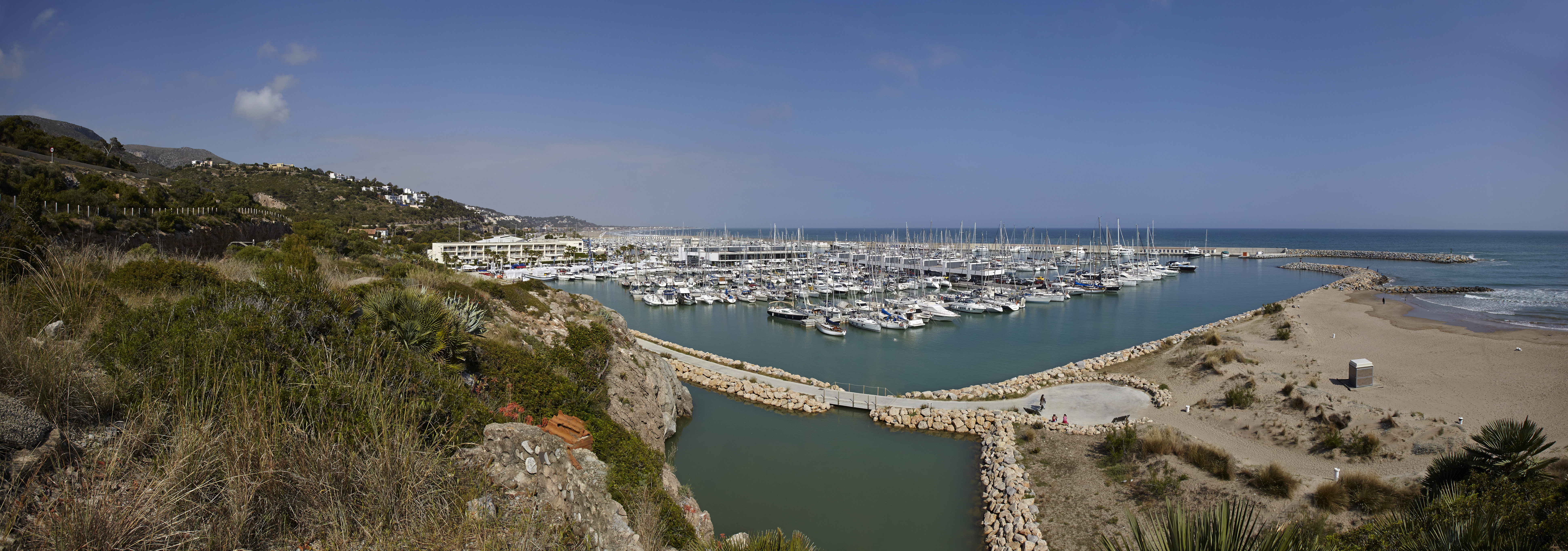 Vista general de Port Ginesta, entre el Mar Mediterráneo y el Macizo del Garraf.